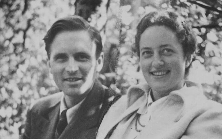 Karl & Veronica Carstens Busestr. 67 [?], Bremen. Auf. 1949